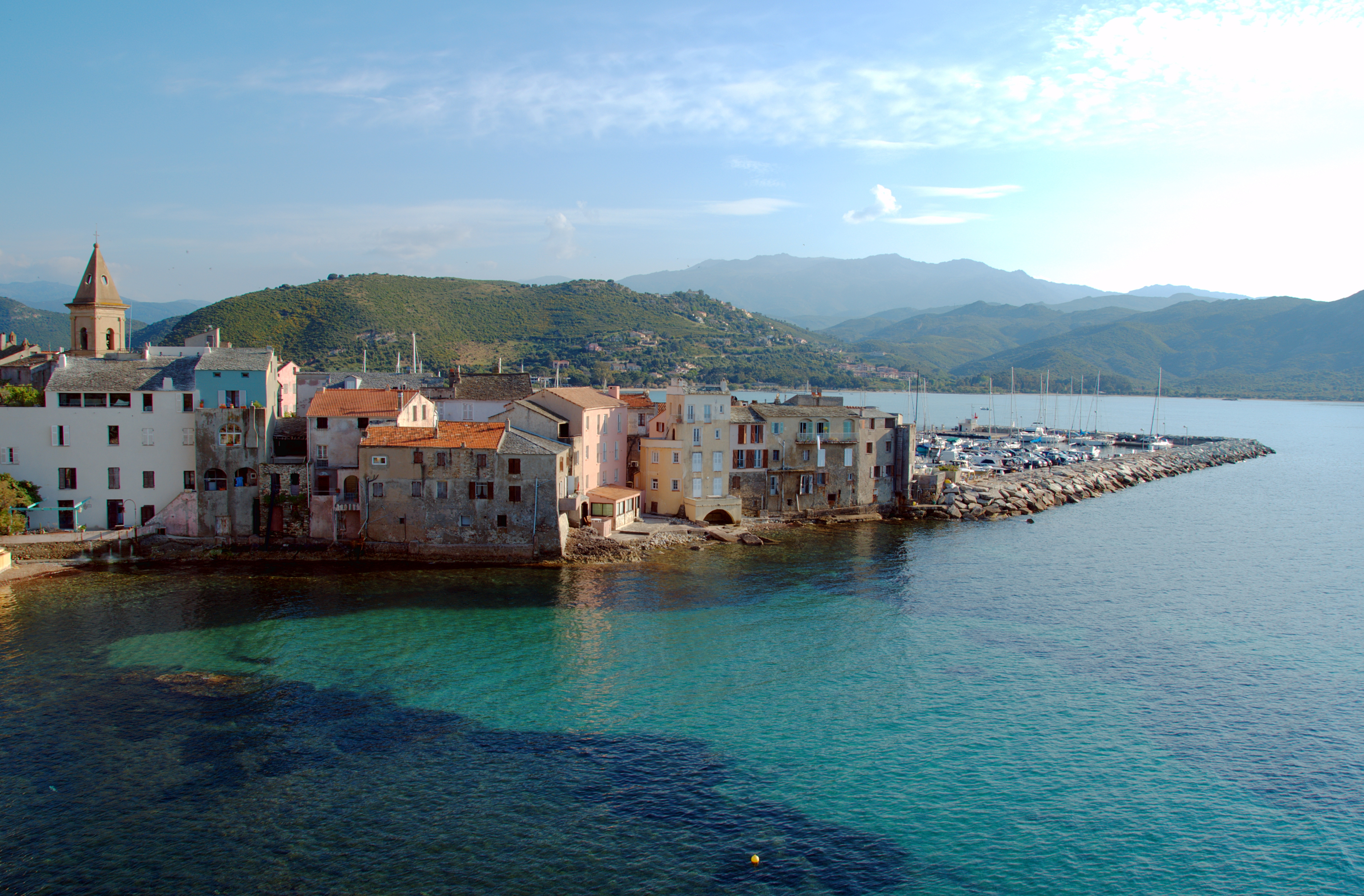 Сен-Флоран. Вид от цитадели.